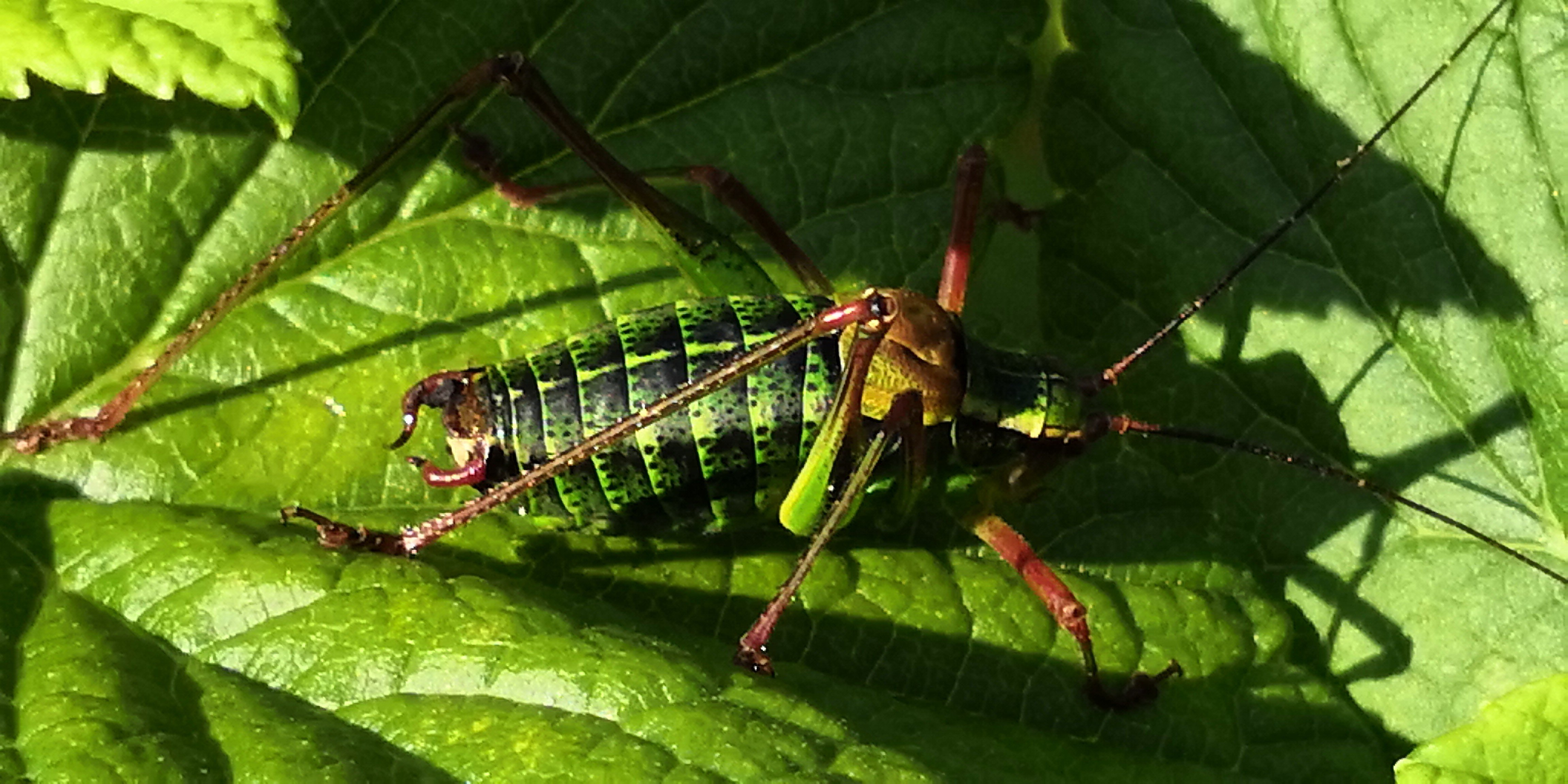 Männchen